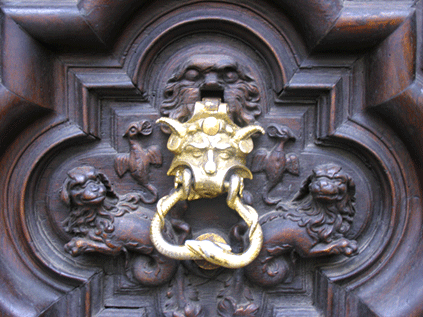 Primo piano della maniglia